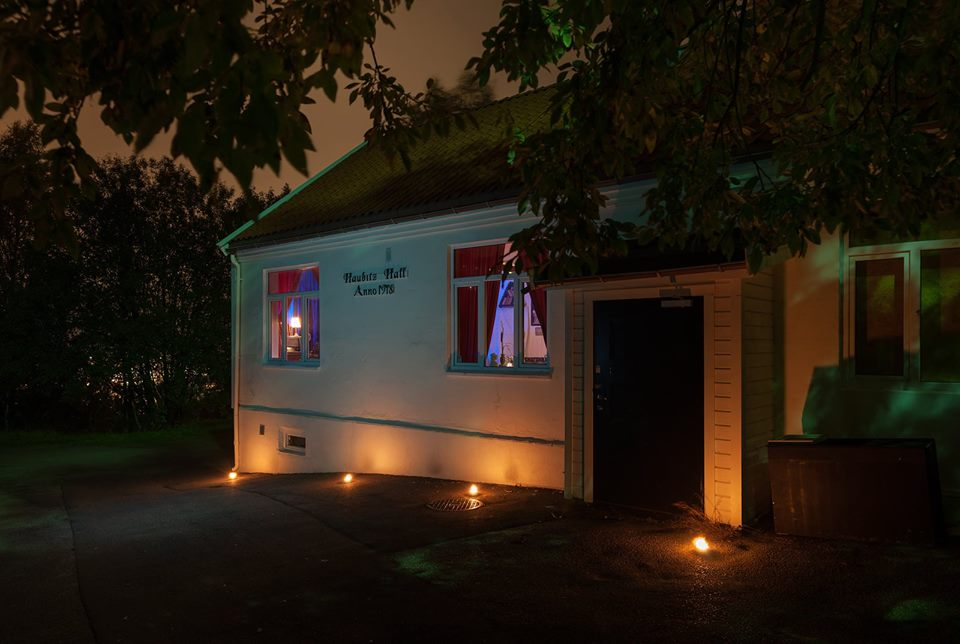 Haubitz Hall